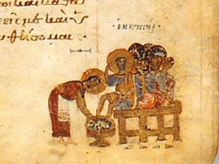 Psaume 50, Psautier de Théodore, Monastère du Studion, Constatinople _ British Museum.